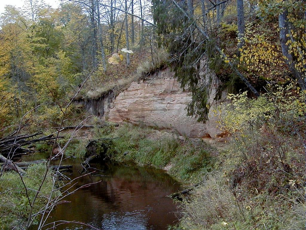 Kankarīšu iezis pie Vijas ietekas Gaujā 2004-10-09